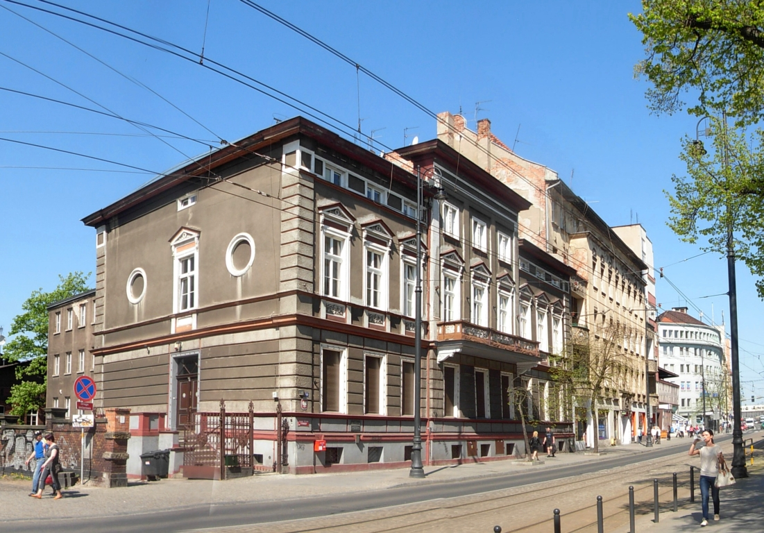 Archiwum Państwowe ul. Dworcowa 65 w Bydgoszczy